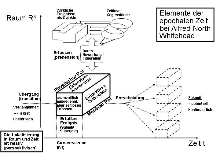 Graphische Übersicht über die wichtigsten Elemente in der Theorie der epochalen Zeit bei Alfred North Whitehead